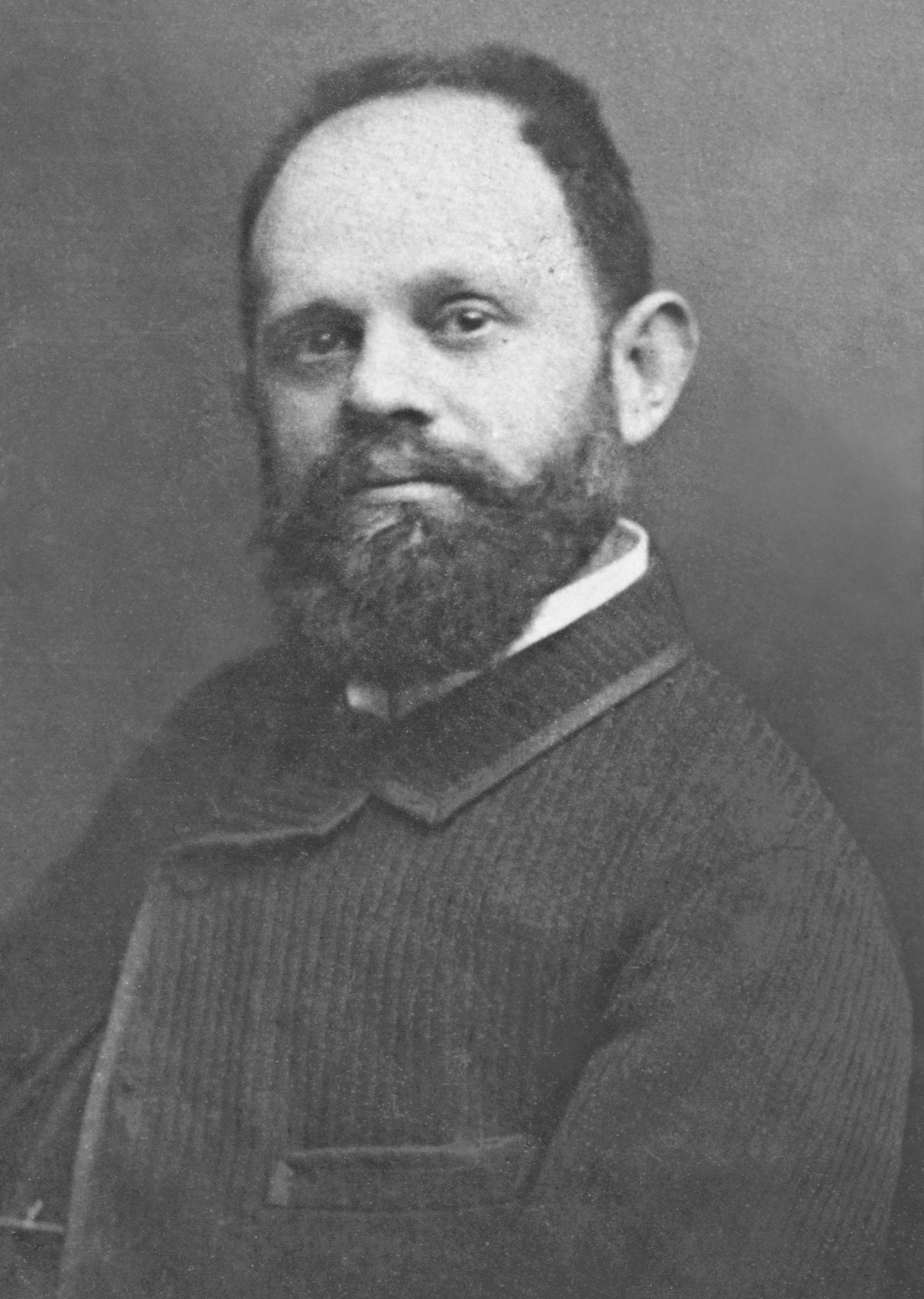 Francesco Mauro, Italian chemist